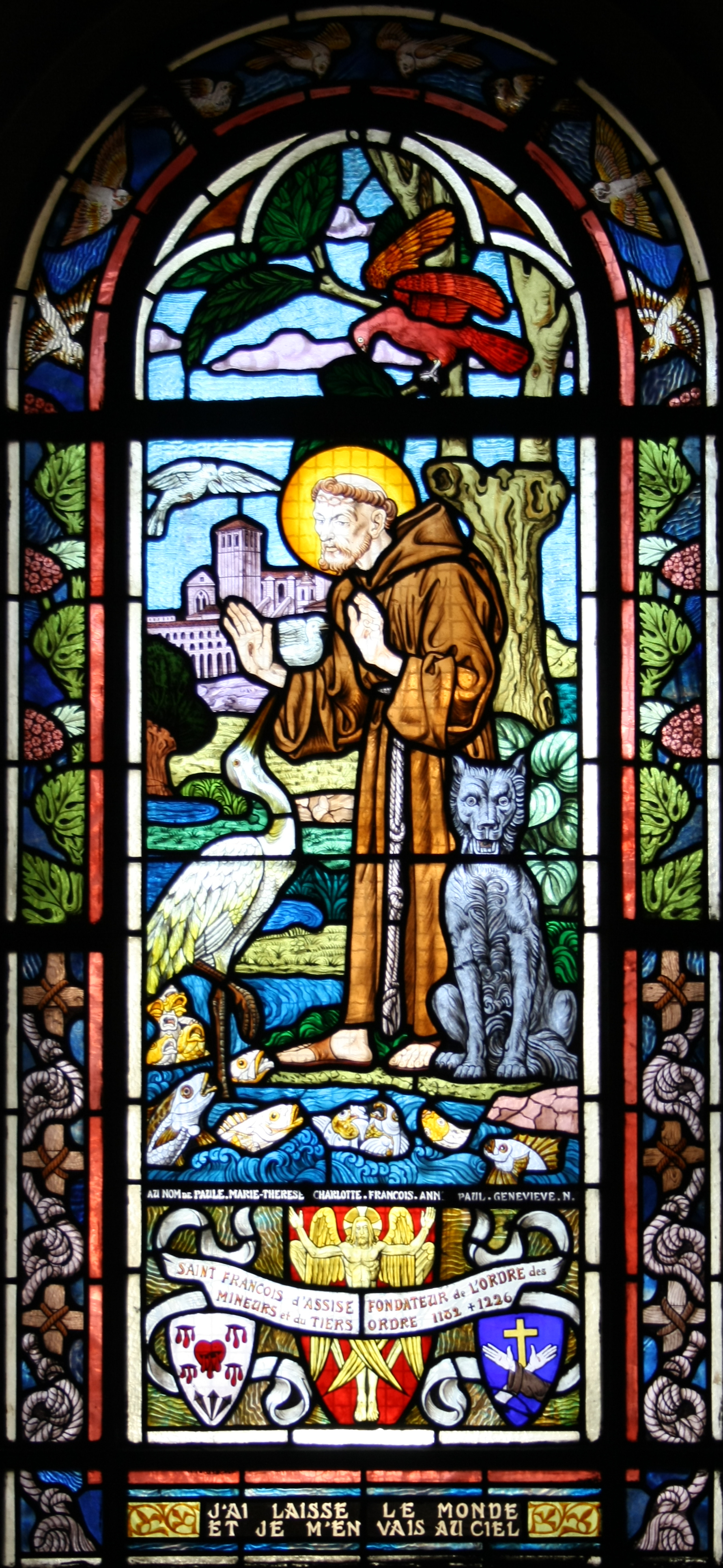 Bleiglasfenster in der Kirche Saint-Honoré d'Eylau (Avenue Raymond-Poincaré im 16. Arrondissement von Paris), Darstellung: hl. Franz von Assissi (1182-1226), Hersteller des Fensters: Félix Gaudin nach einem Karton von Raphaël Freida.